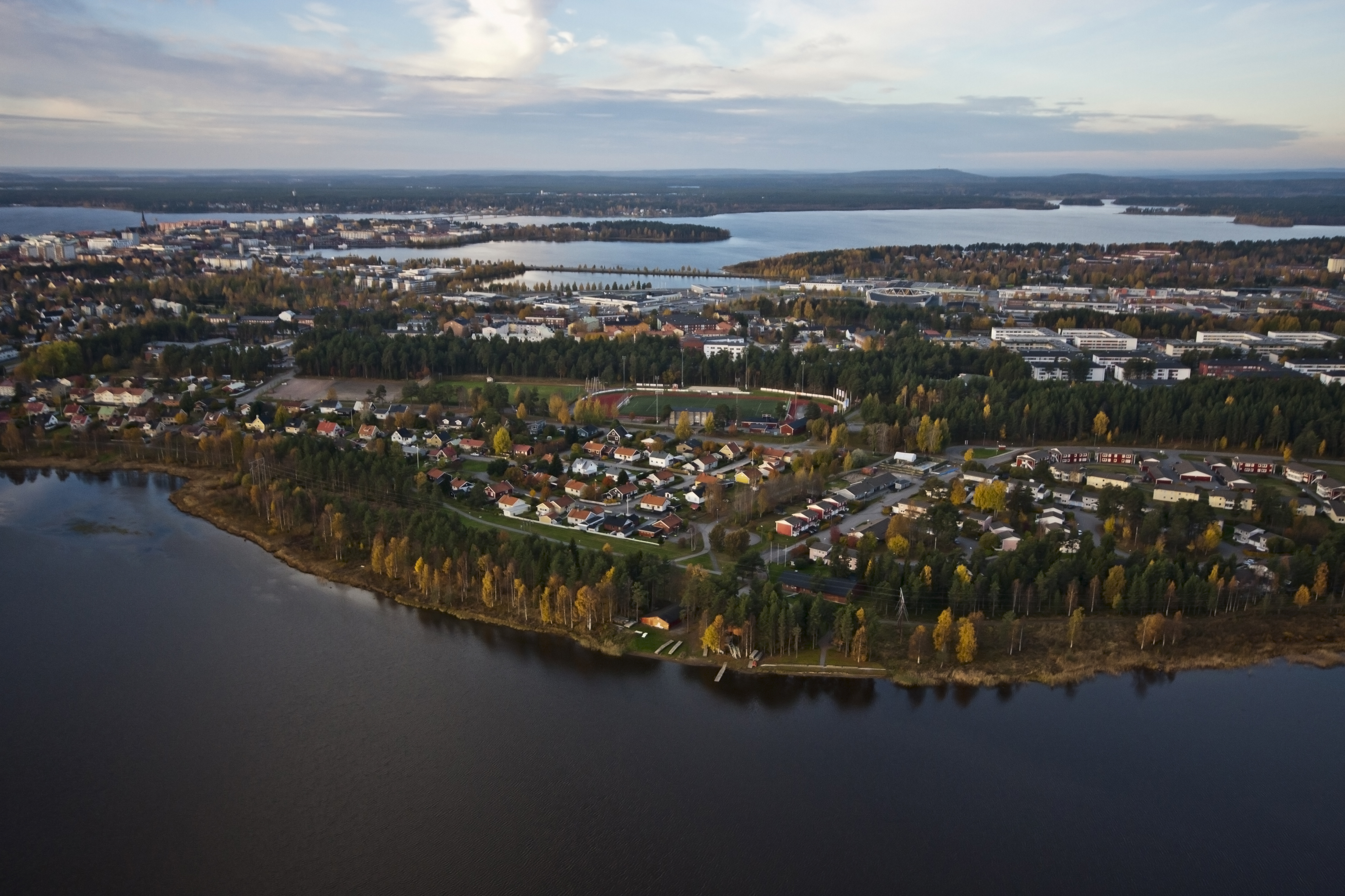 Flygfoto över bostadsområdet Bergviken i Luleå